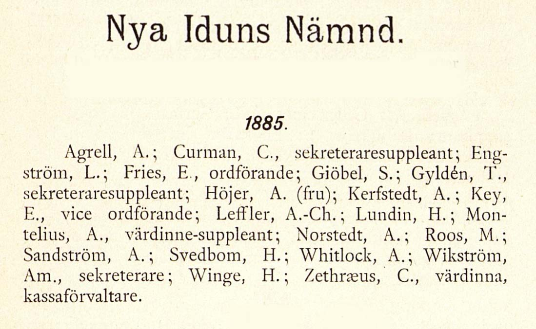 Nya Idun bildat 7 februari 1885